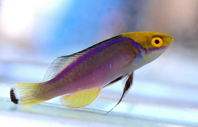 Cirrhilabrus claire esemplare maschile